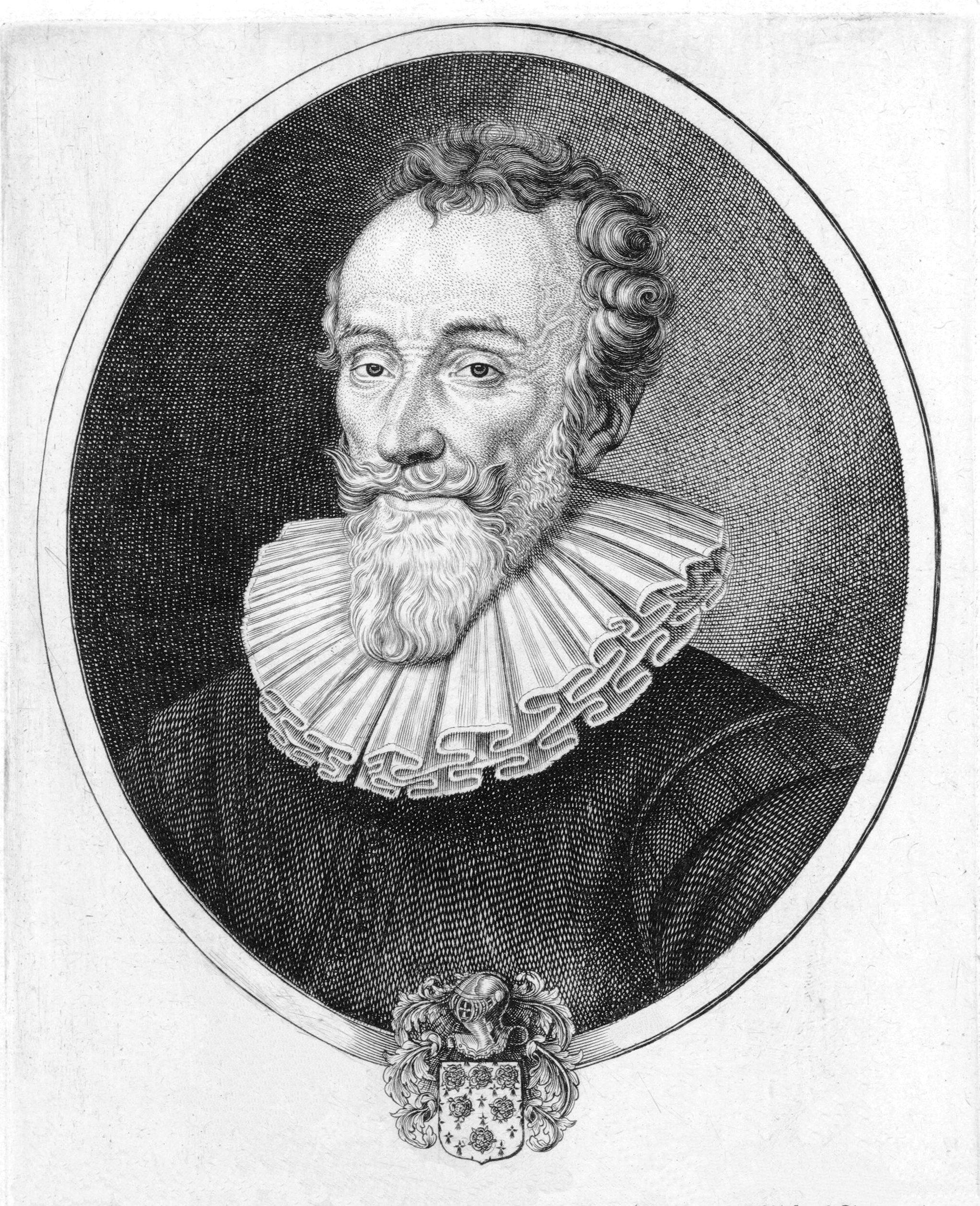 François de Malherbe, en buste, de 3/4 dirigé à gauche, dans une bordure ovale. Éditeur: À Paris, chez Pierre Mariette, rue S. Jacques, à l'Espérance. Avec privilège du Roy.